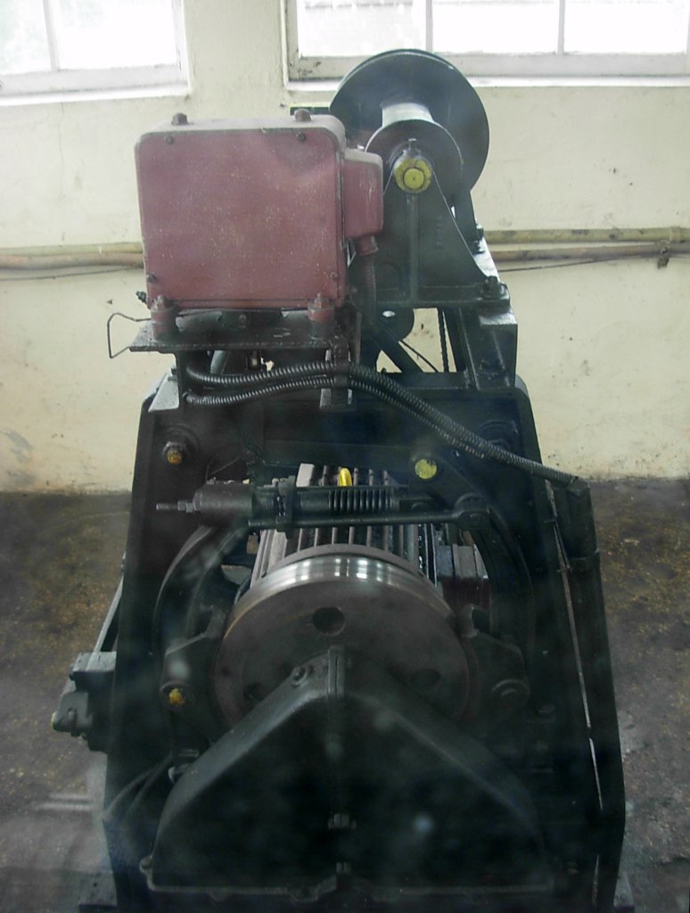 Śluza Okole na Kanale Bydgoskim - silnik elektryczny do otwierania wrót